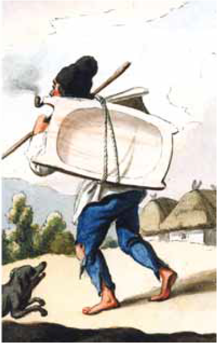 Bayache portant des pétrins à vendre